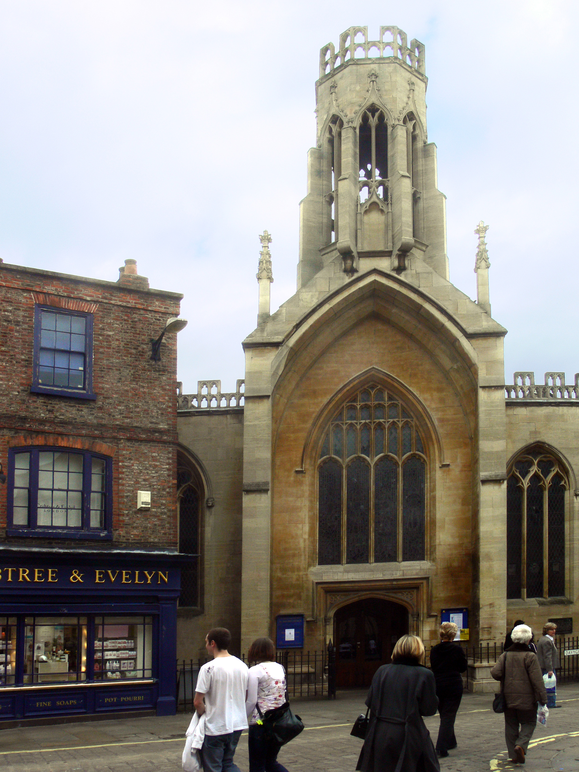 Die Kirche der St. Helena in York, benannt nach der Mutter Kaiser Konstantins